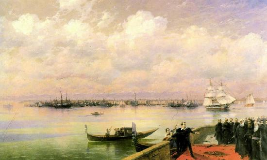 Посещение Байроном мхитаристов на острове св. Лазаря в Венеции